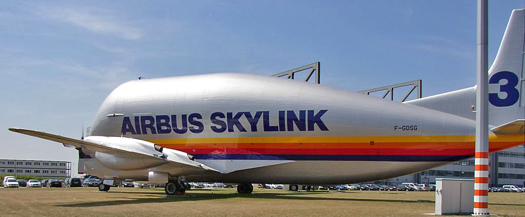 Einer der Super Guppys, der bei AIRBUS im Einsatz war